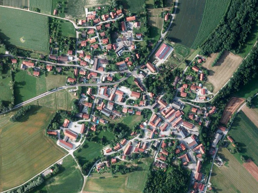 Luftaufnahme der Bayerischen Vermessungsverwaltung: Giggenhausen, Gemeinde Neufahrn, Landkreis Freising, Regierungsbezirk Oberbayern, Bayern.